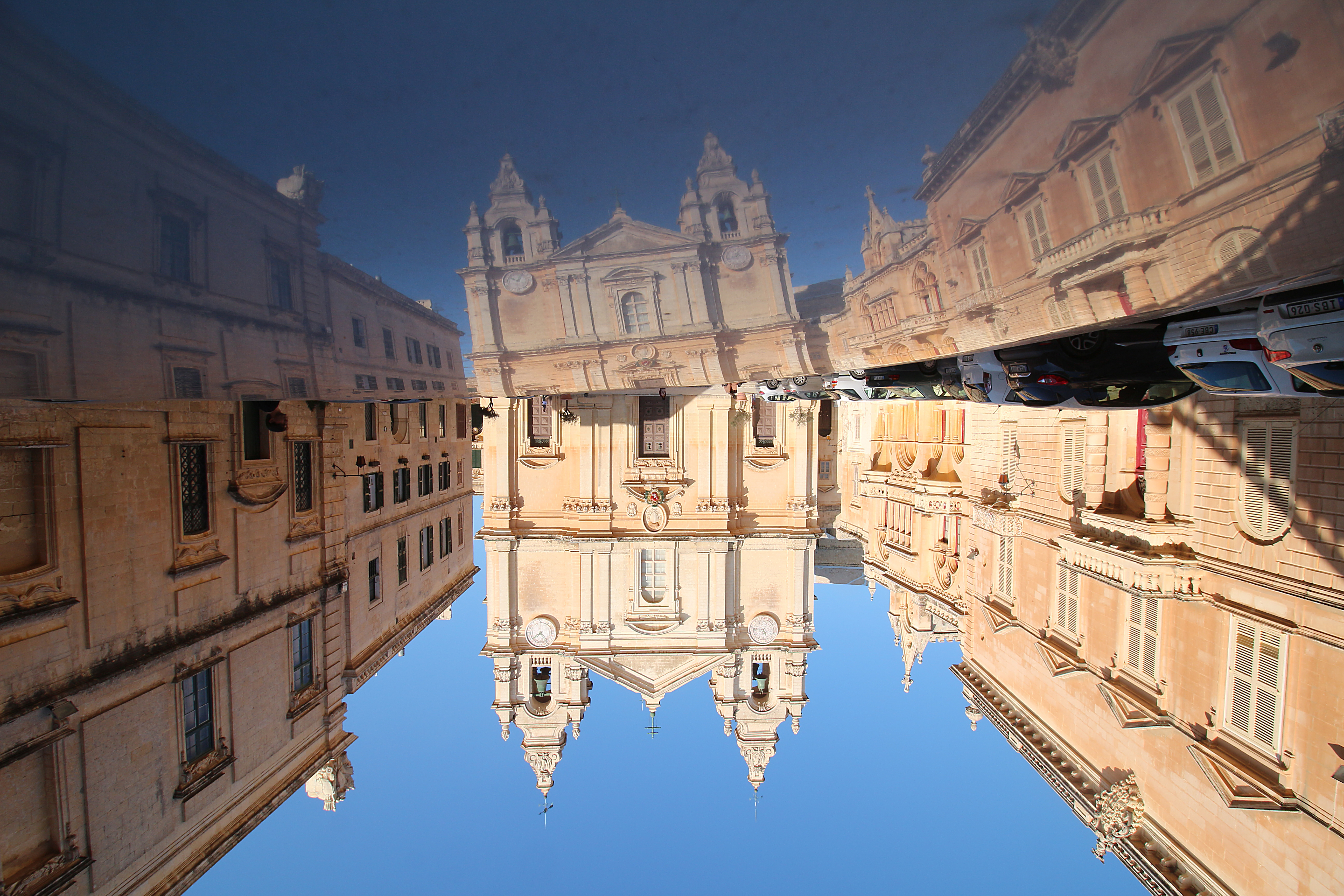 Katedralen i Mdina, Malta - spegelbild i biltak.